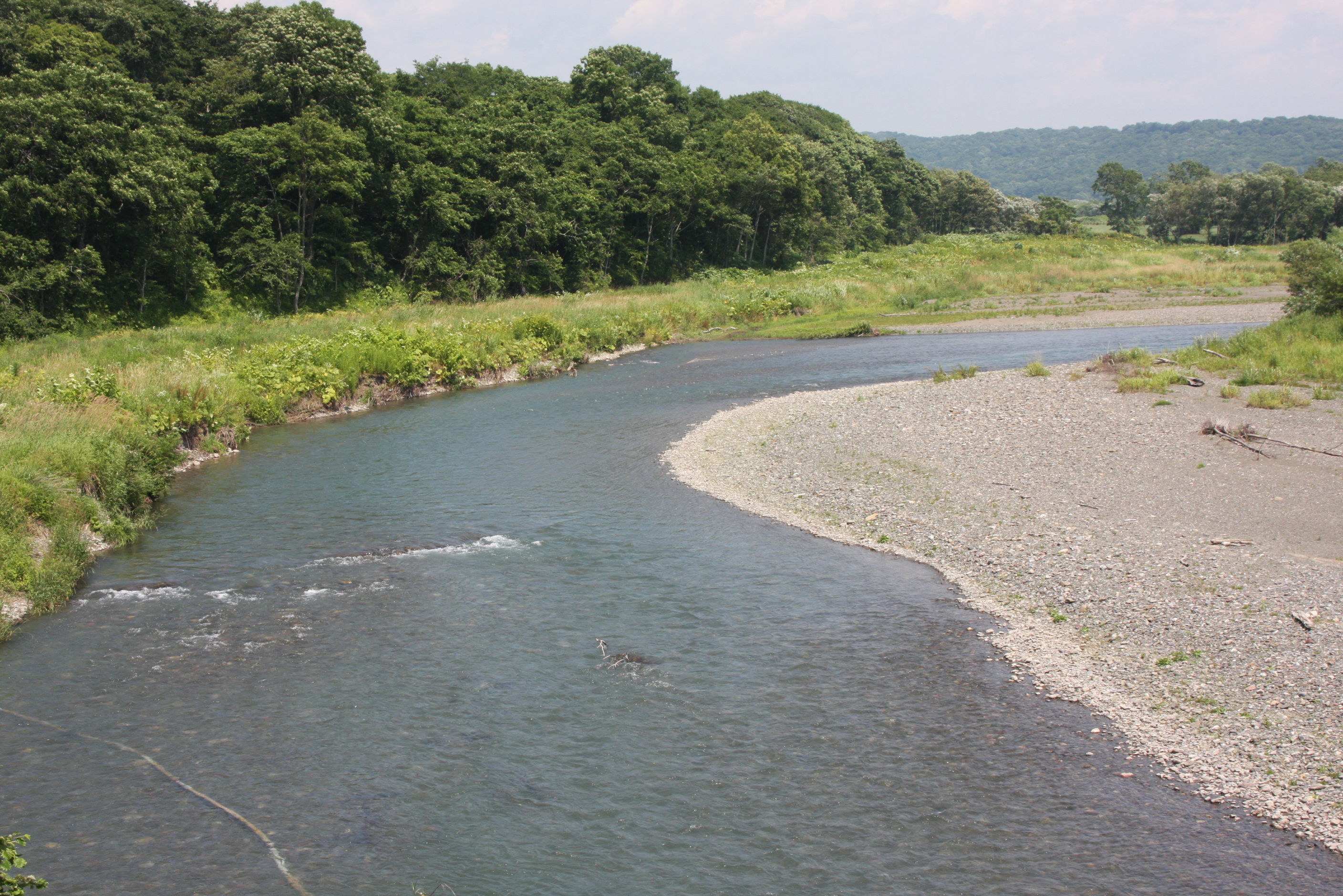 新冠川（新冠町） 姉去橋より上流を望む